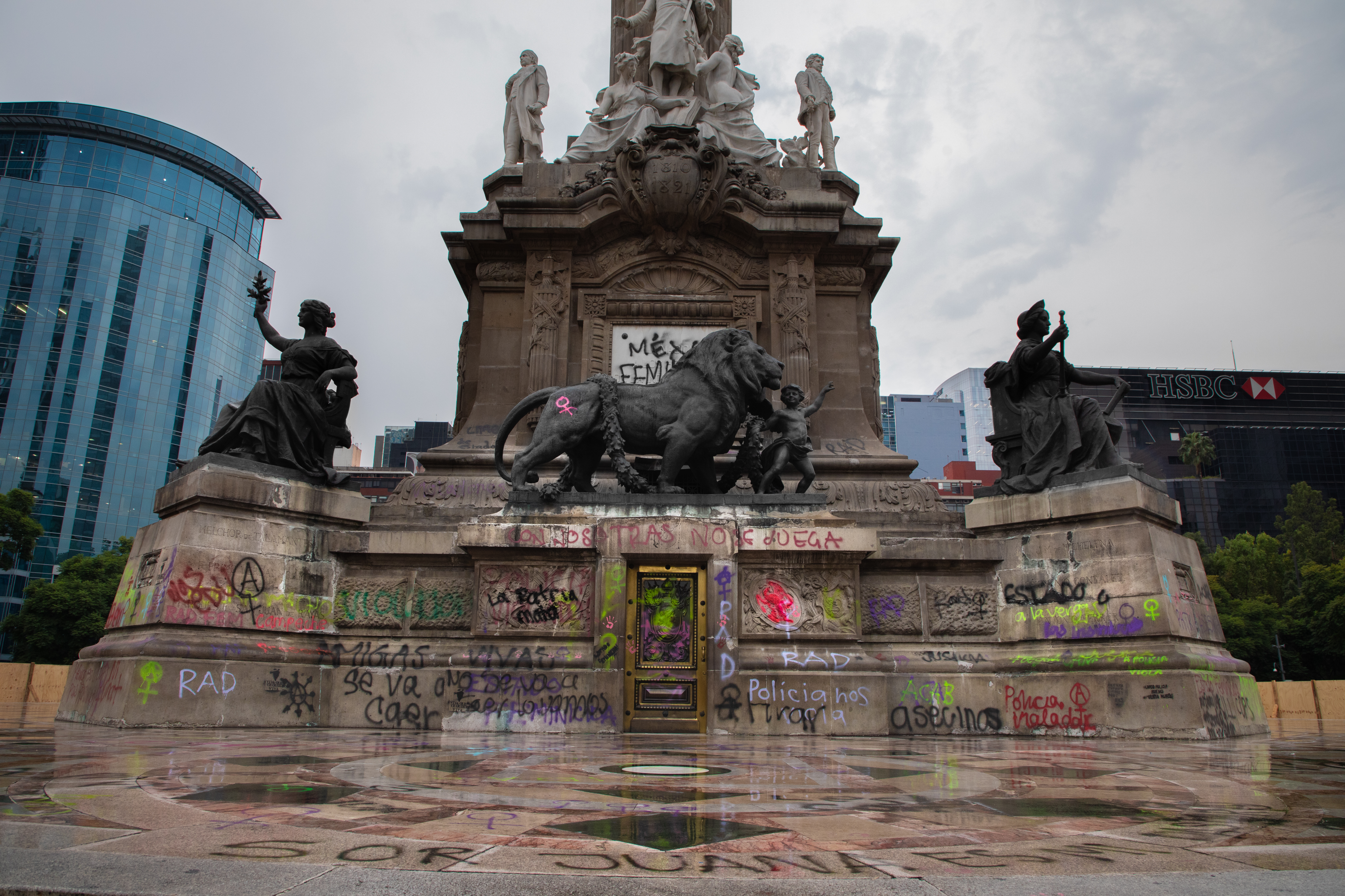 Imagen del Monumento a la Independencia con las intervenciones posteriores a la marcha del 16 de agosto 2019